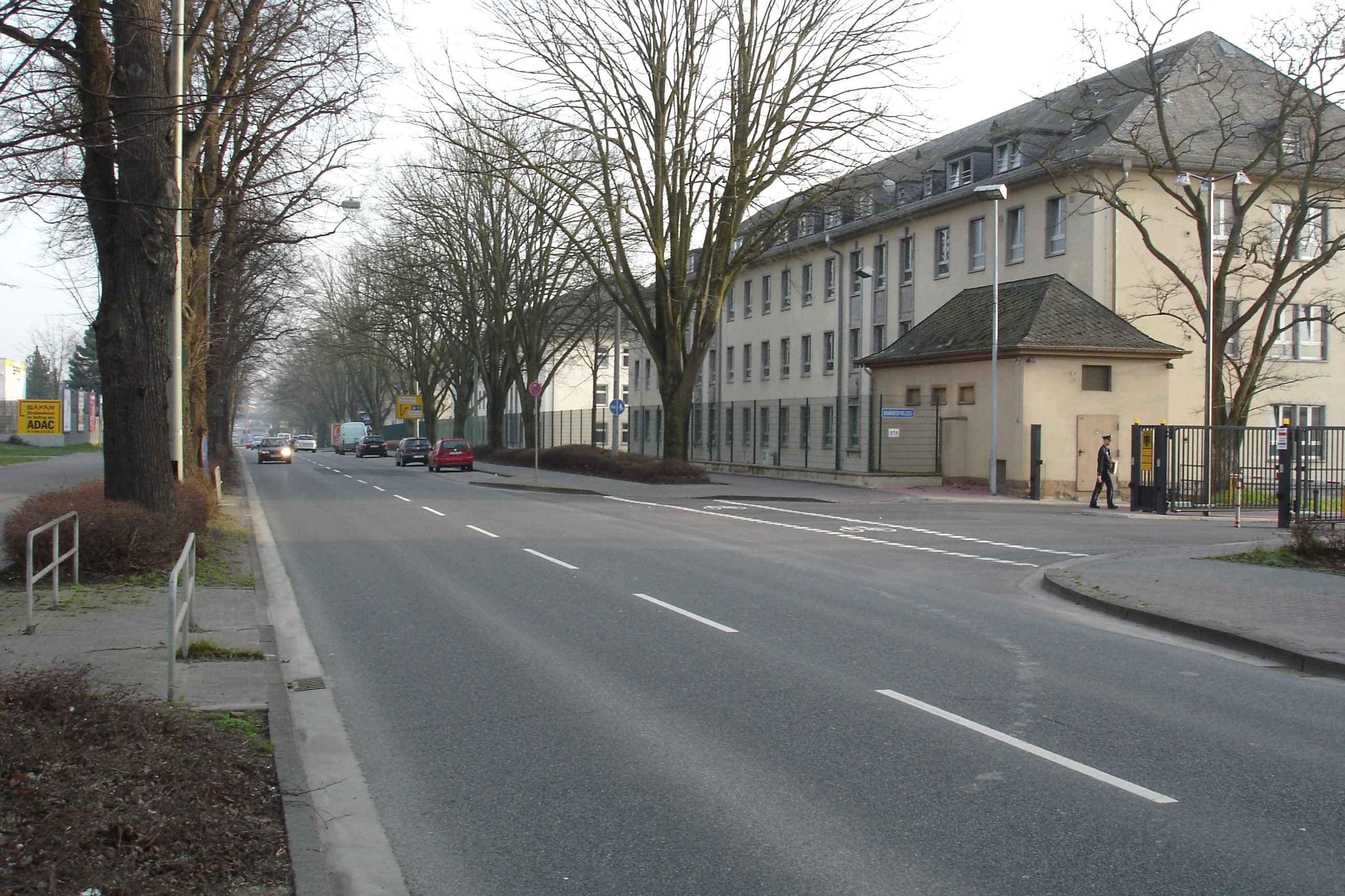 Bundespolizei an der Homburger Landstraße von Norden (Ffm-Preungesheim)